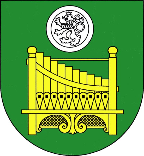 Znak obce Cítoliby